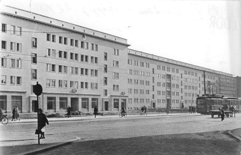 Leipzig, Neubauten Zentralbild Illner 24.5.1952 Wohnungsbau in Leipzig Innerhalb eines Jahres entstand dieses bisher größte Bauvorhaben mit 238 Wohnungen und 17 Läden in der Straße der III. Weltfestspiele in Leipzig. Information added by Wikimedia users.heutiger Name der Straße: Ranstädter Steinweg